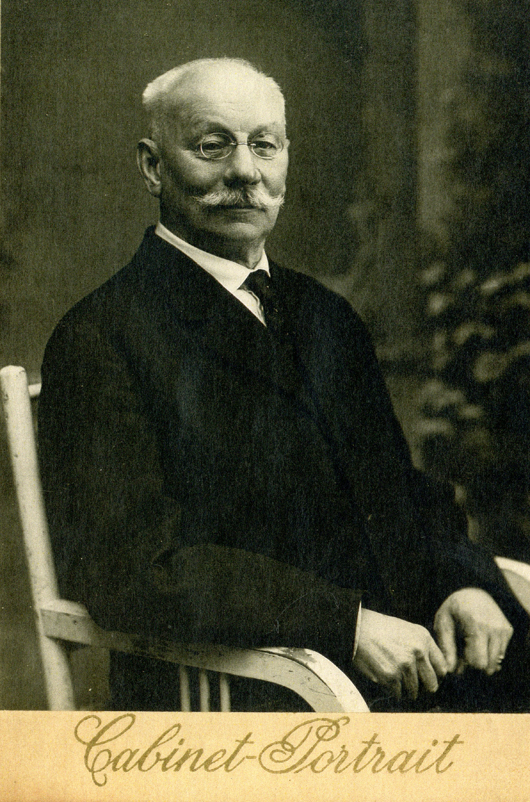 Ю́лий Миха́йлович Шока́льский (1856 — 1940) — русский учёный-географ, океанограф, картограф, генерал-лейтенант (1912), председатель Русского географического общества (1917—1931).